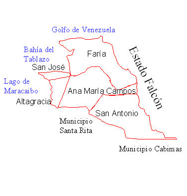 Parroquias del Municipio Miranda, Estado Zulia, Venezuela